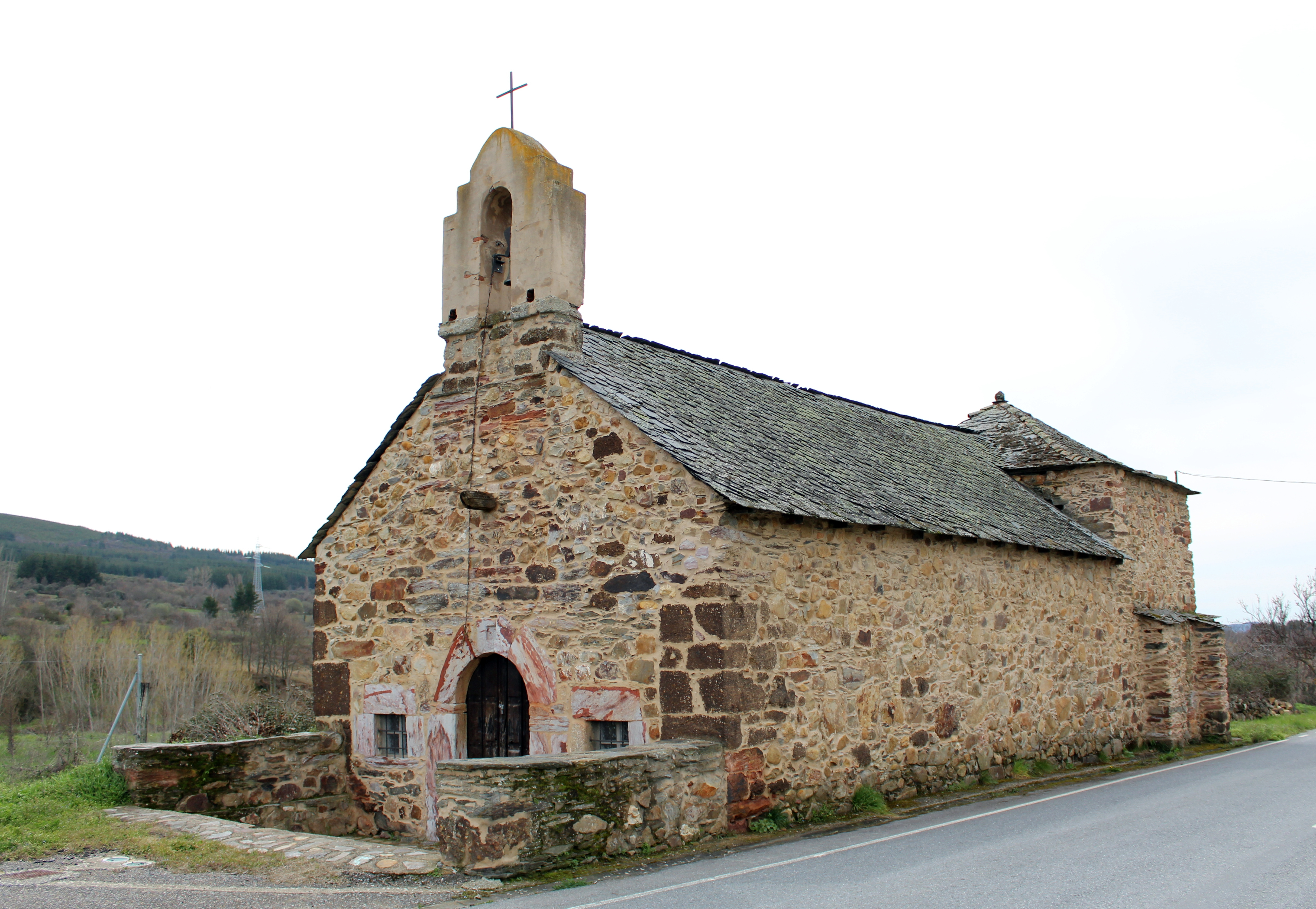 Ermita del Cristo en Castropodame, provincia de León, comarca de El Bierzo.